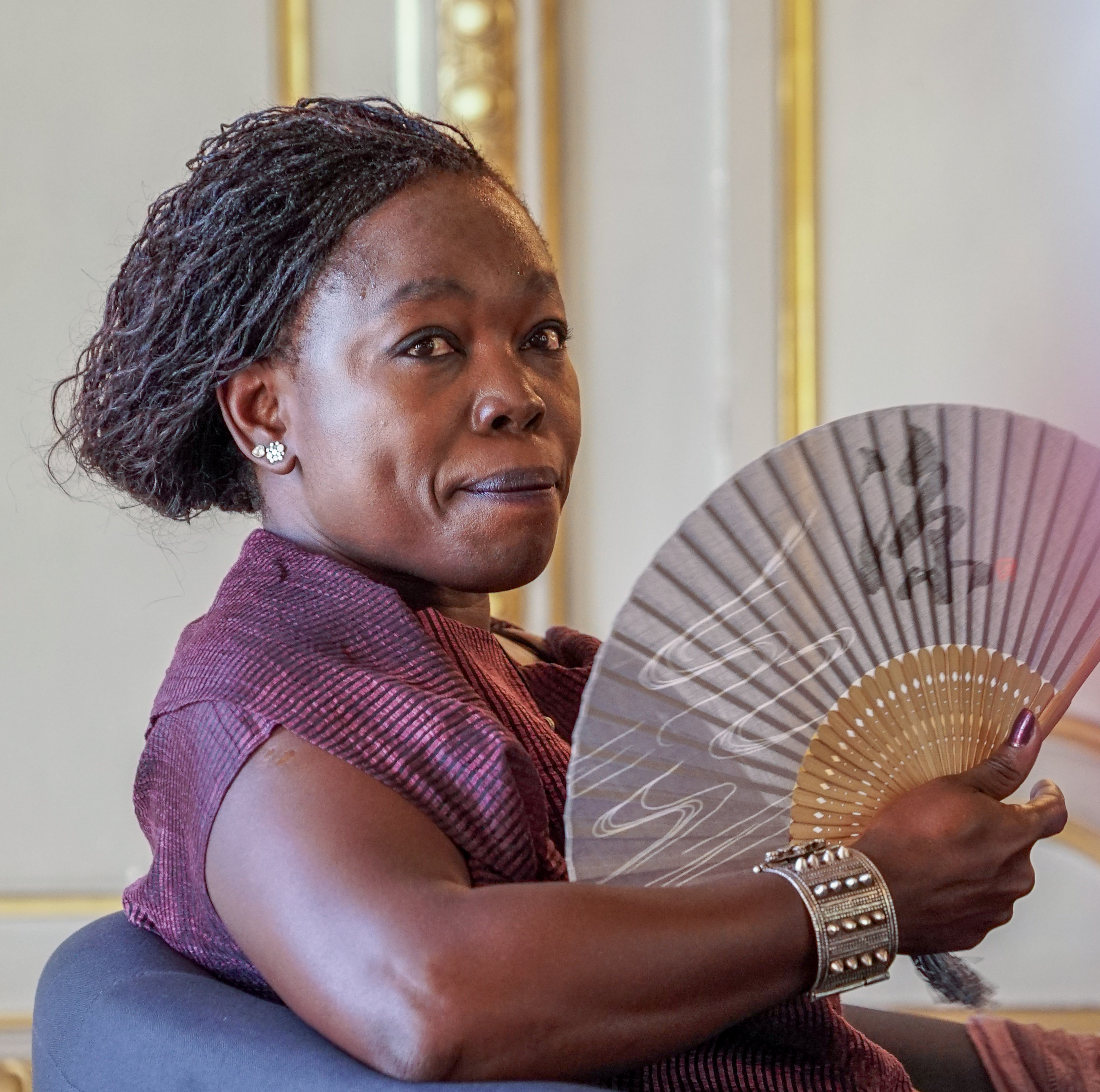 présente au Livre sur la place de Nancy.